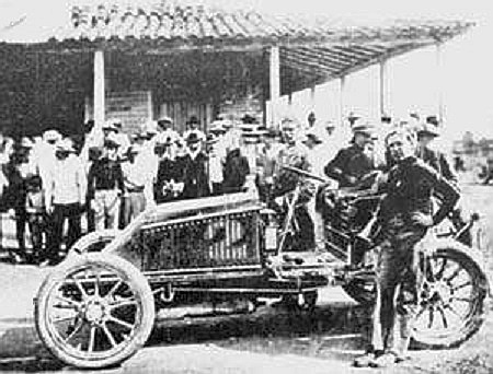 Joe Tracy deuxième de la première Course Cubaine, le 15 février 1905 sur Renault AK 40 hp - photo Santa Coloma